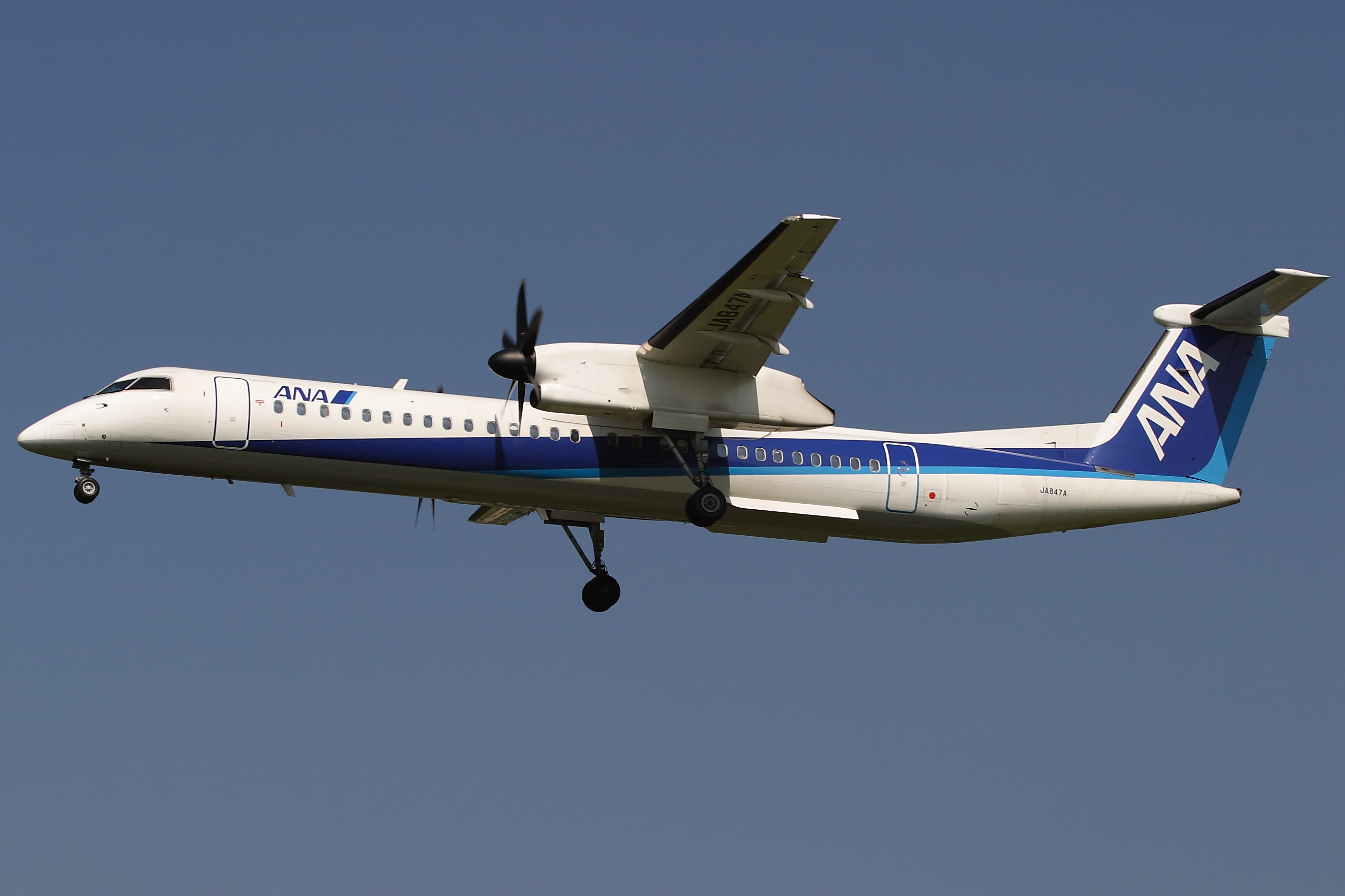 エアーニッポンネットワーク ボンバルディア DHC-8-400 福岡空港